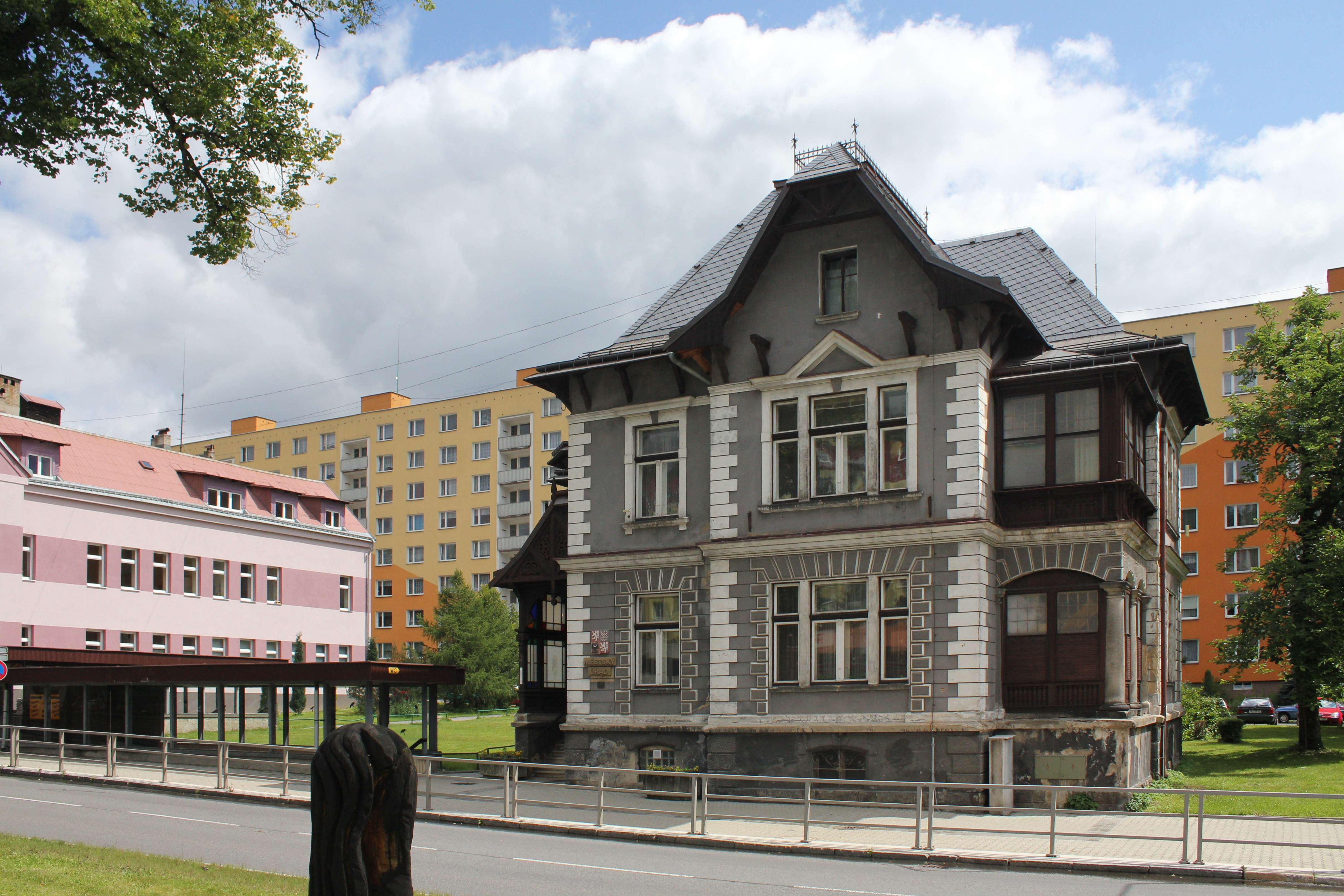 Obecní úřad, Desná